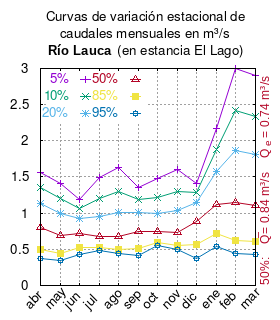 Curva de Variación Estacional del río Lauca en Estancia El Lago, aguas abajo de la bocatoma del Canal Lauca. # cita publicación # | apellido = Dirección General de Aguas # | nombre = # | enlace-autor = Ministerio de Obras Públicas (Chile) # | título = Diagnóstico y clasificación de los cursos y cuerpos de agua según objetivos de calidad. Cuenca Río Lauca # | ubicación = Santiago de Chile # | editorial = Ministerio de Obras Públicas (Chile) # | año = 2004 # | edición = # | url = # | urlarchivo = # | fechaarchivo = # | ref = harv # Tabla 4.2 (m3/s) pág. mes 5% 10% 20% 50% 85% 95% abr 1.563 1.351 1.131 0.798 0.502 0.368 may 1.409 1.206 0.999 0.697 0.448 0.345 jun 1.184 1.060 0.927 0.717 0.523 0.434 jul 1.491 1.204 0.957 0.679 0.523 0.479 ago 1.634 1.303 1.015 0.684 0.493 0.437 sep 1.355 1.187 1.012 0.745 0.511 0.410 oct 1.479 1.219 0.994 0.740 0.597 0.556 nov 1.600 1.299 1.034 0.729 0.550 0.498 dic 1.404 1.290 1.152 0.888 0.562 0.371 ene 2.170 1.880 1.578 1.122 0.717 0.533 feb 2.995 2.421 1.871 1.143 0.623 0.436 mar 2.900 2.343 1.811 1.106 0.602 0.422 This plot was created with Gnuplot.